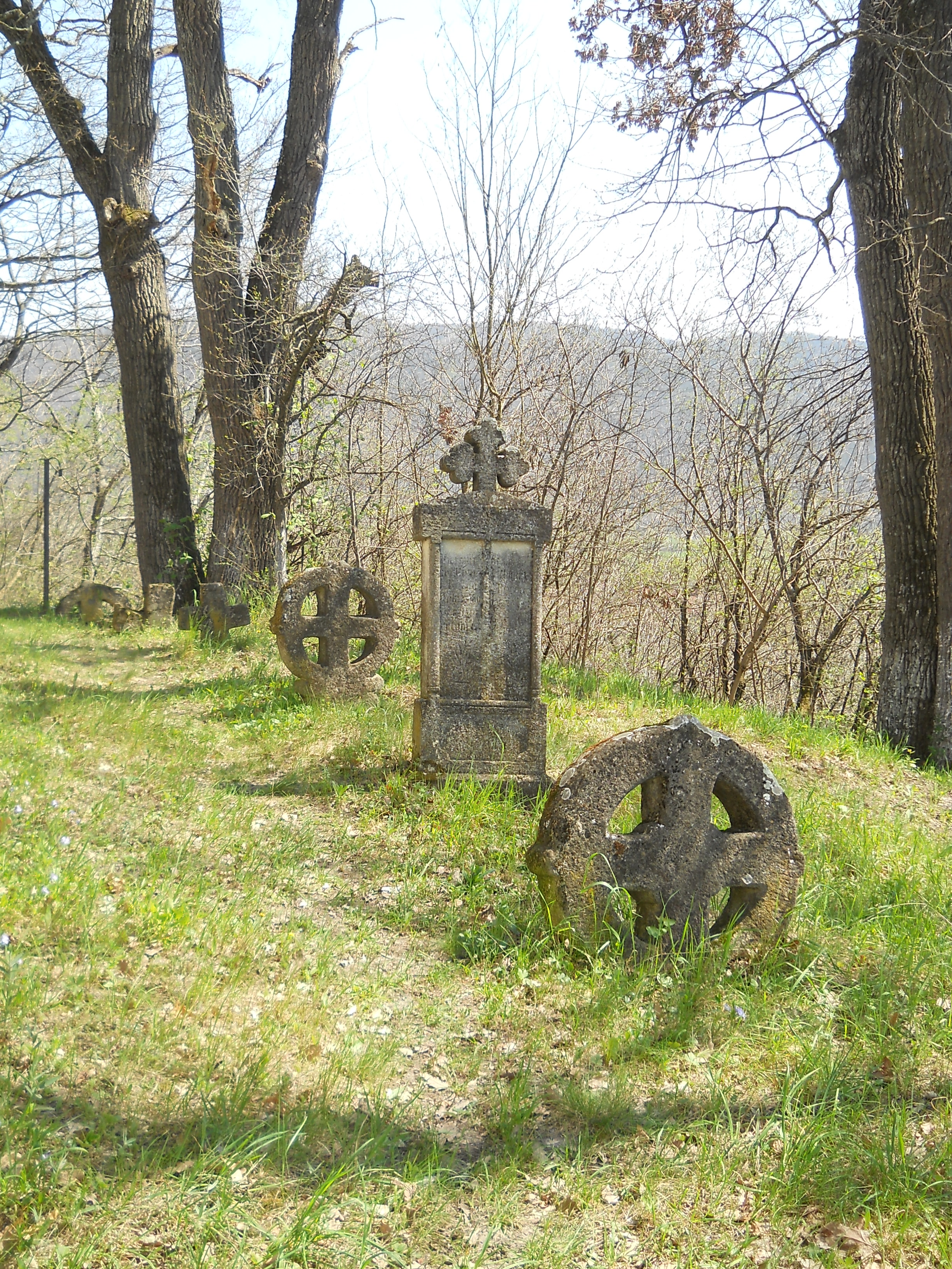 Cimitirul bisericii "Sf. Arhangheli Mihail și Gavriil" 02